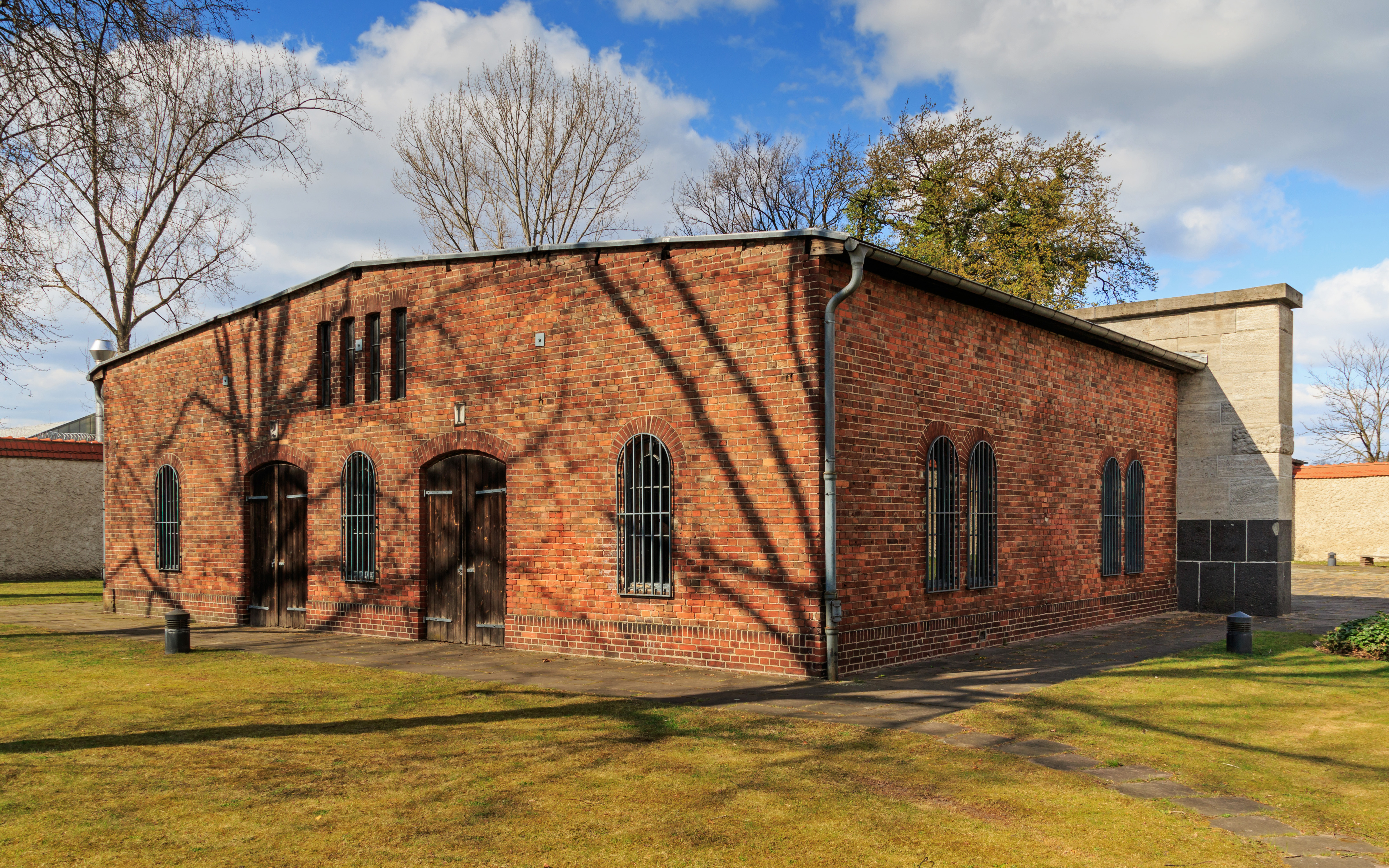 Gedenkstätte Plötzensee: ehem. Hinrichtungsschuppen